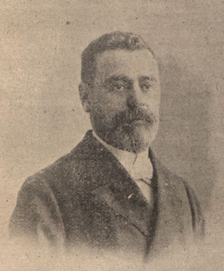 "Georges Montorgueil, chevalier de la Légion d'honneur, rédacteur à L’Éclair, membre de la Patrie Française".